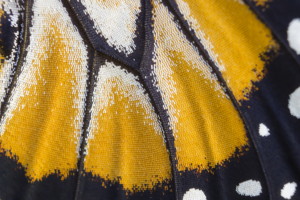 Local: Araçatuba/SP - Brasil Bioma: Mata Atlântica Acessórios: Tripé + Raynox DCR-250 + Cabo Disparador Remoto